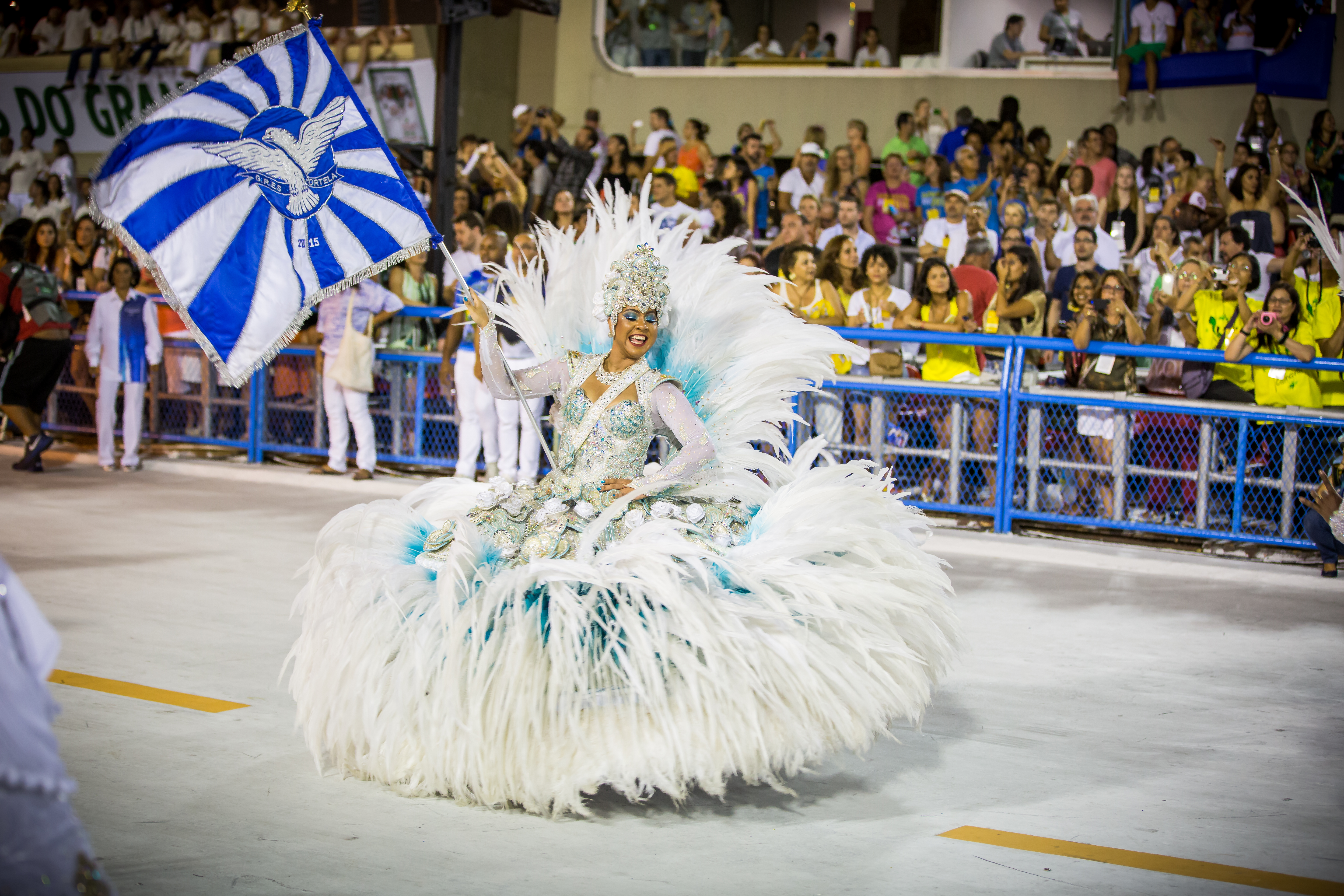 E70A2744.jpg